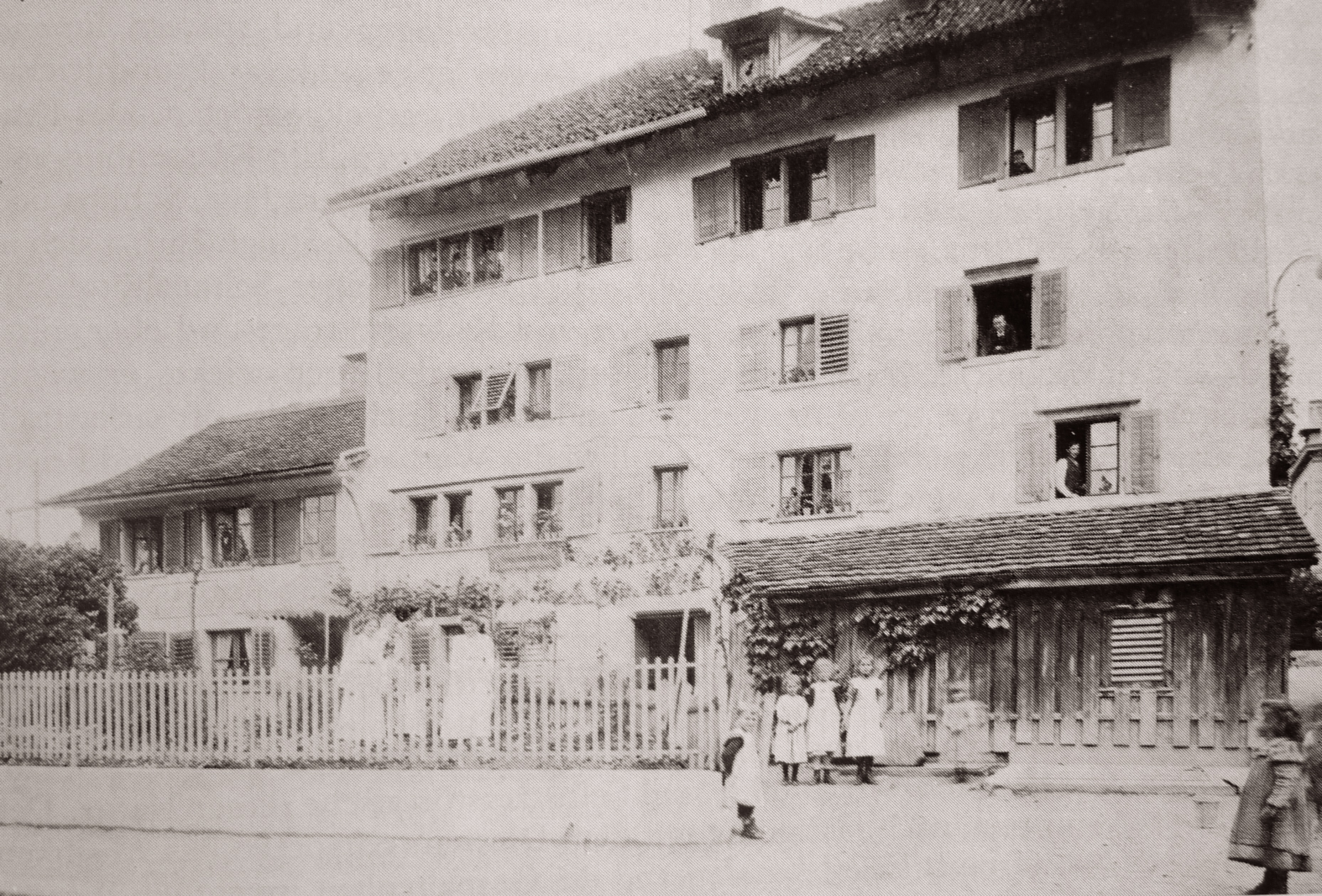 Höchhus Küsnacht: 1910